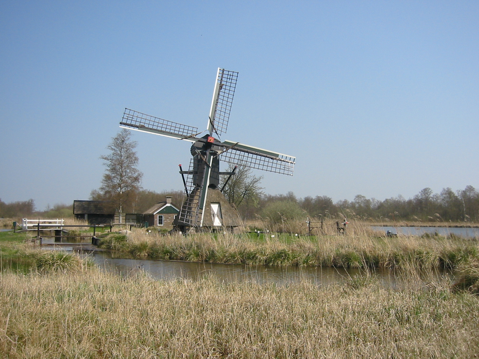 eigen foto. GerardM 15 apr 2004 18:09 (CEST)